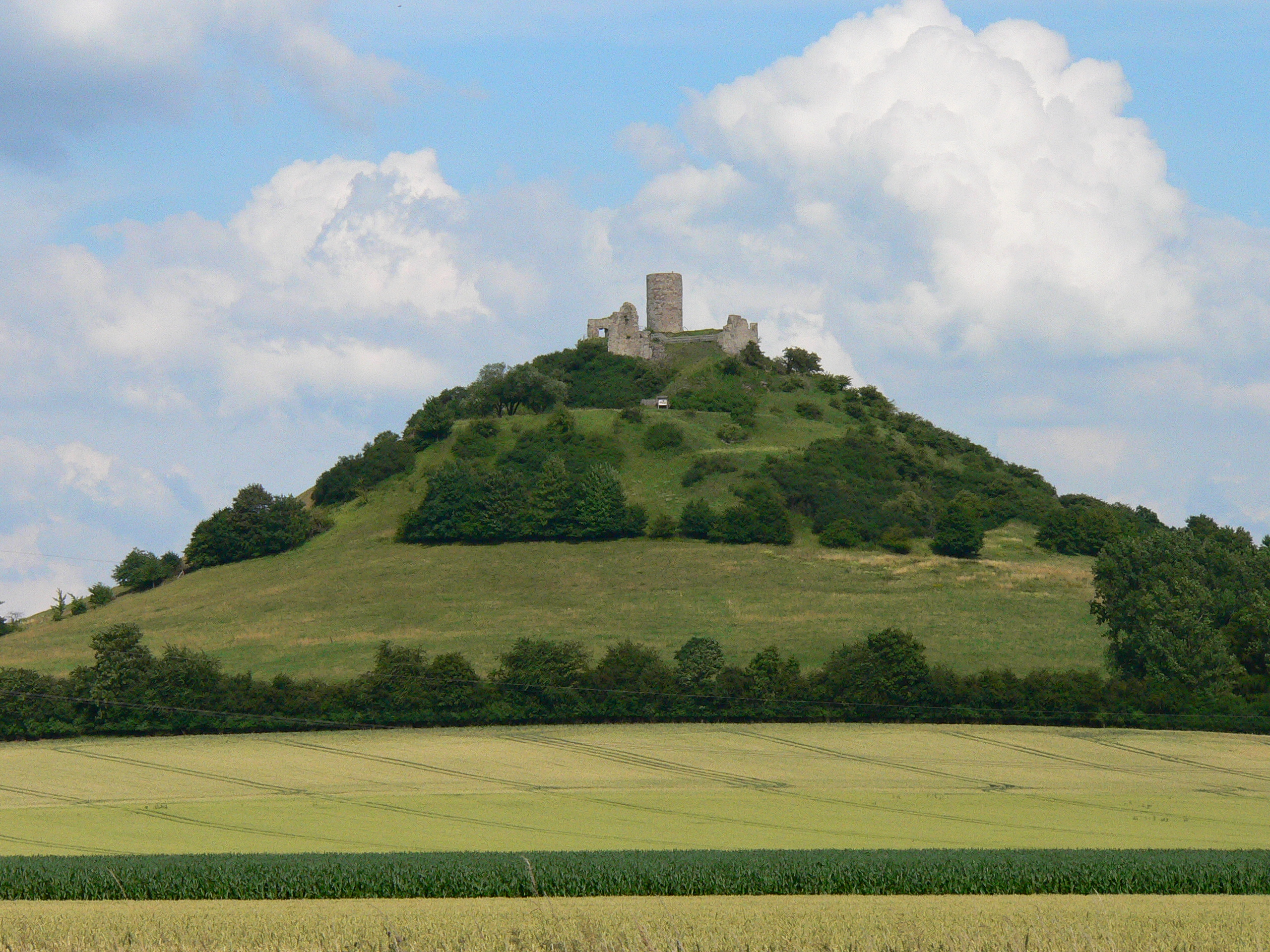 Deutschland, Nordrhein-Westfalen: Ruine Desenberg Westansicht